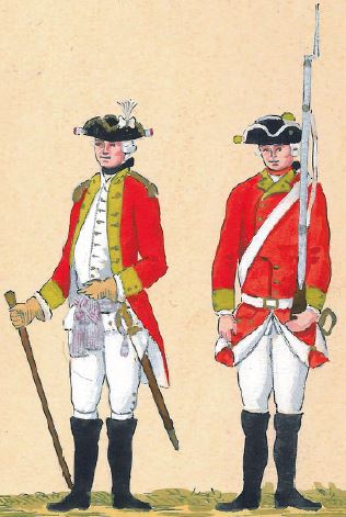 46. Regiment Pieszy Koronny (Kaliksta Ponińskiego)